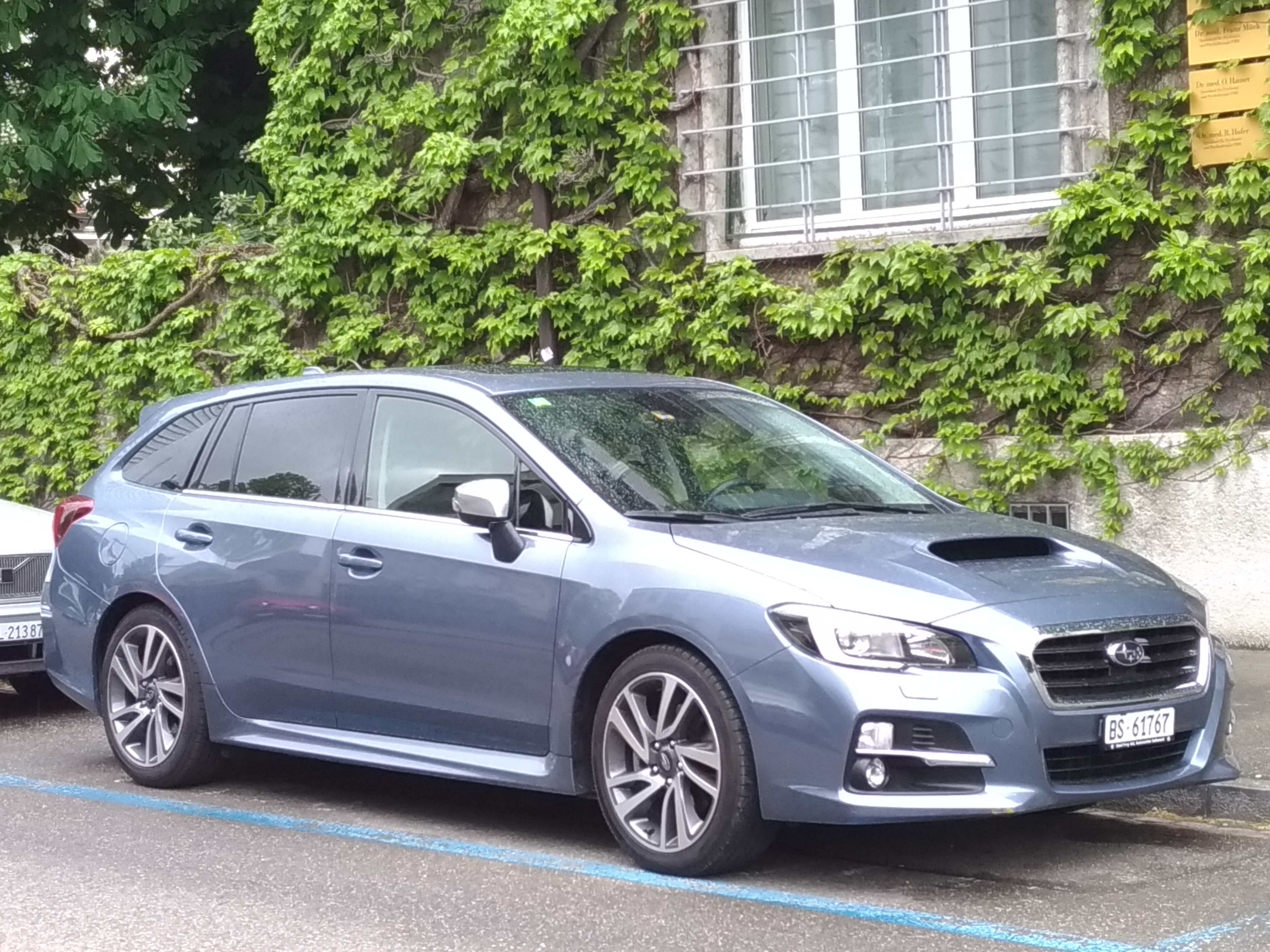 Subaru Levorg at Basel